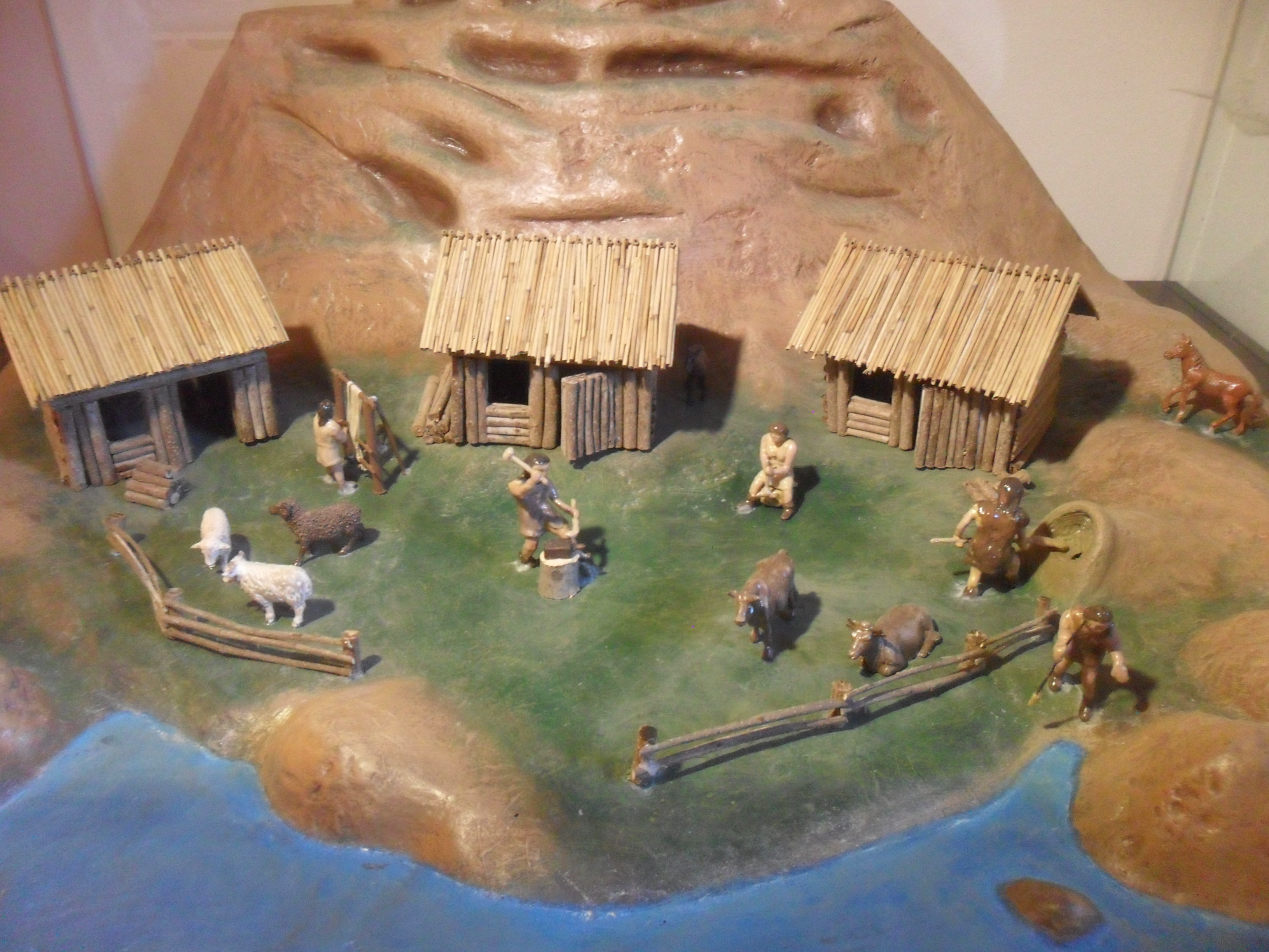 Tekkeköy Mağaraları Arkeoloji Vadisi Müze Evi'nde yer alan Tunç Çağında Tekkeköy'deki yerleşim maketi.